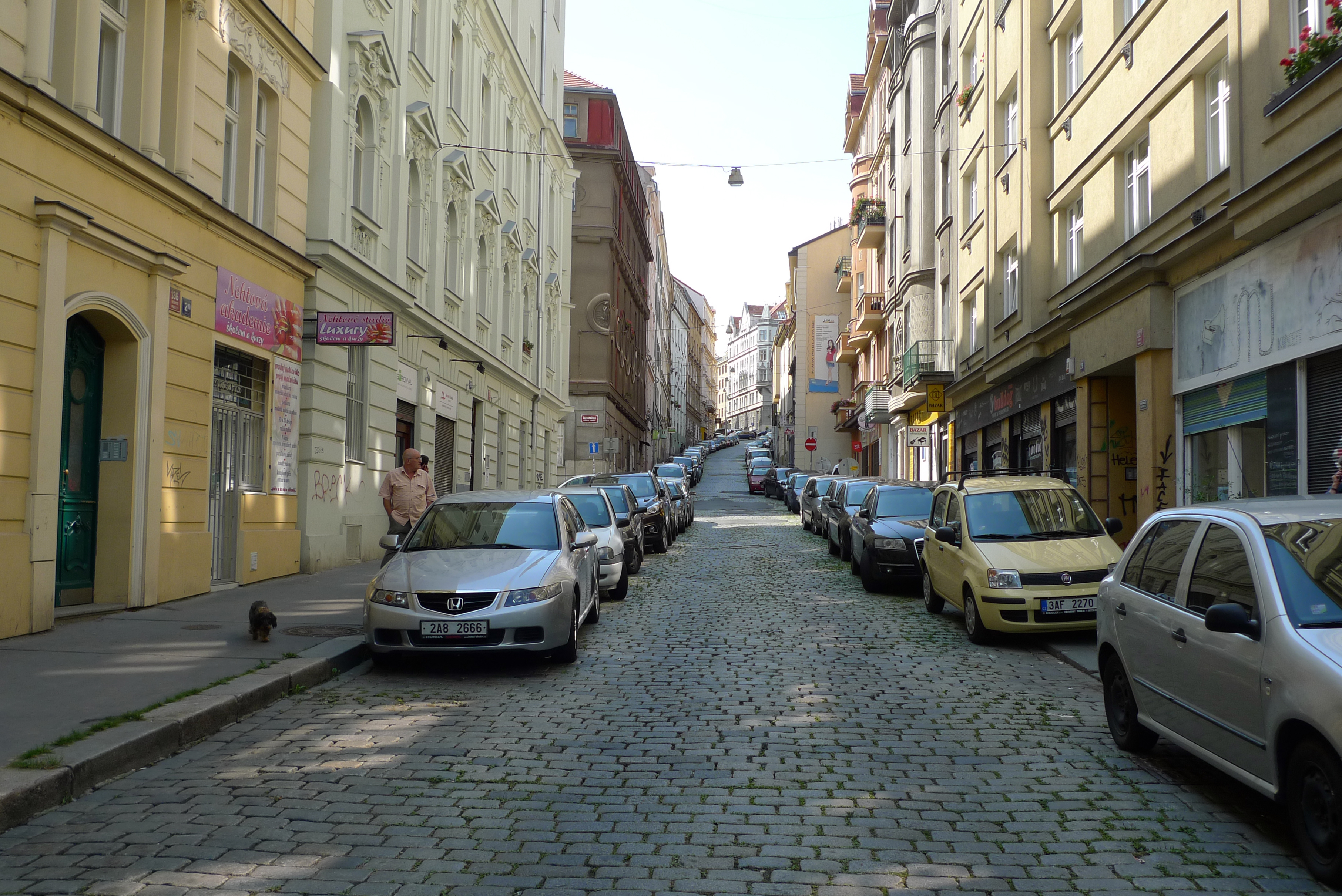 Krymská ulice v Praze 10.